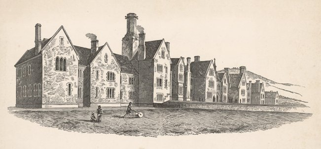 Asylum building, man pushing a lawn roller.